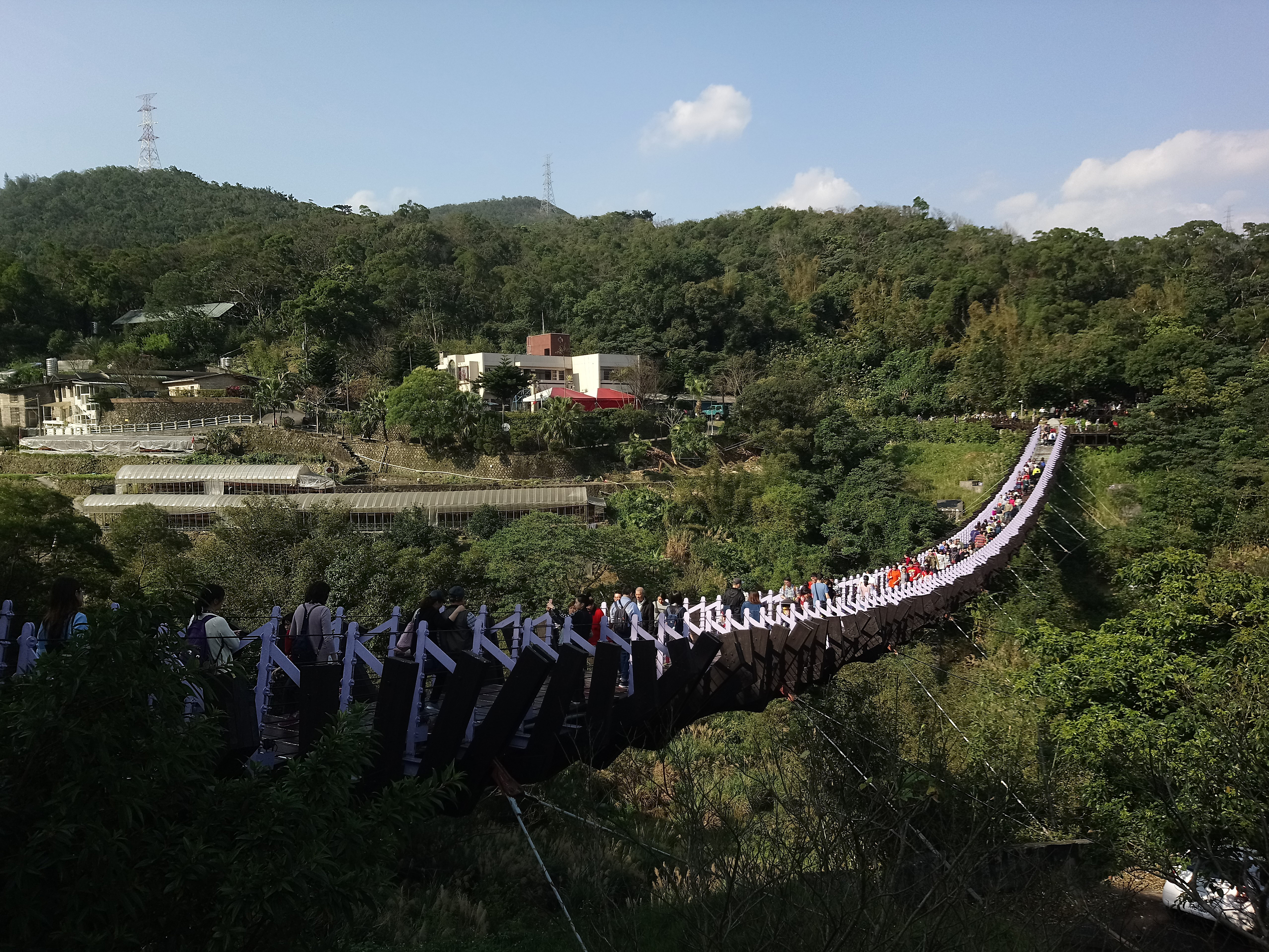 白石湖吊橋,台北市內湖區金龍次分區碧山里